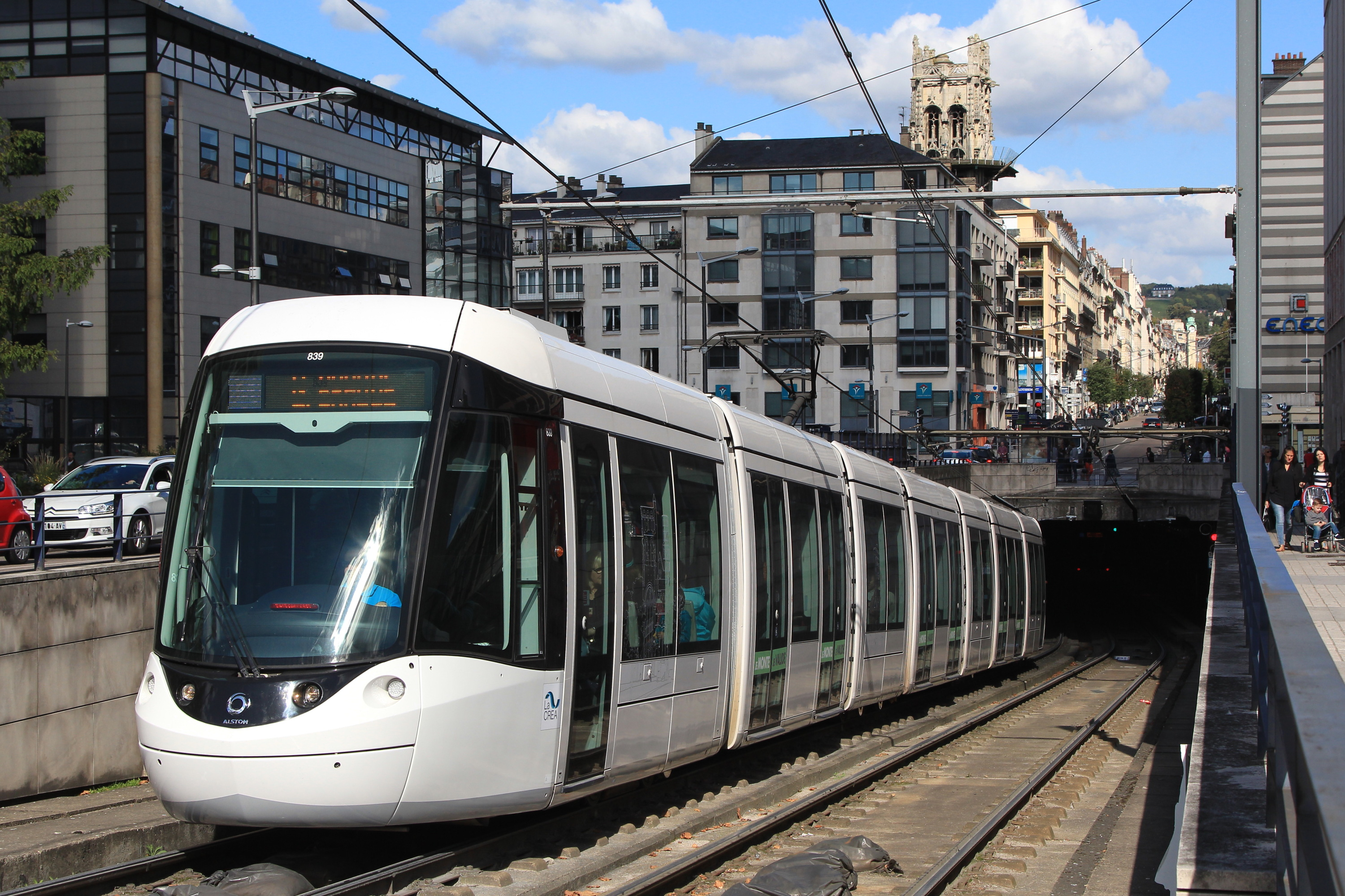 La rame Citadis n°839 du tramway (ou métro !) de Rouen sort du souterrain, après avoir desservit la station Théâtre des Arts.